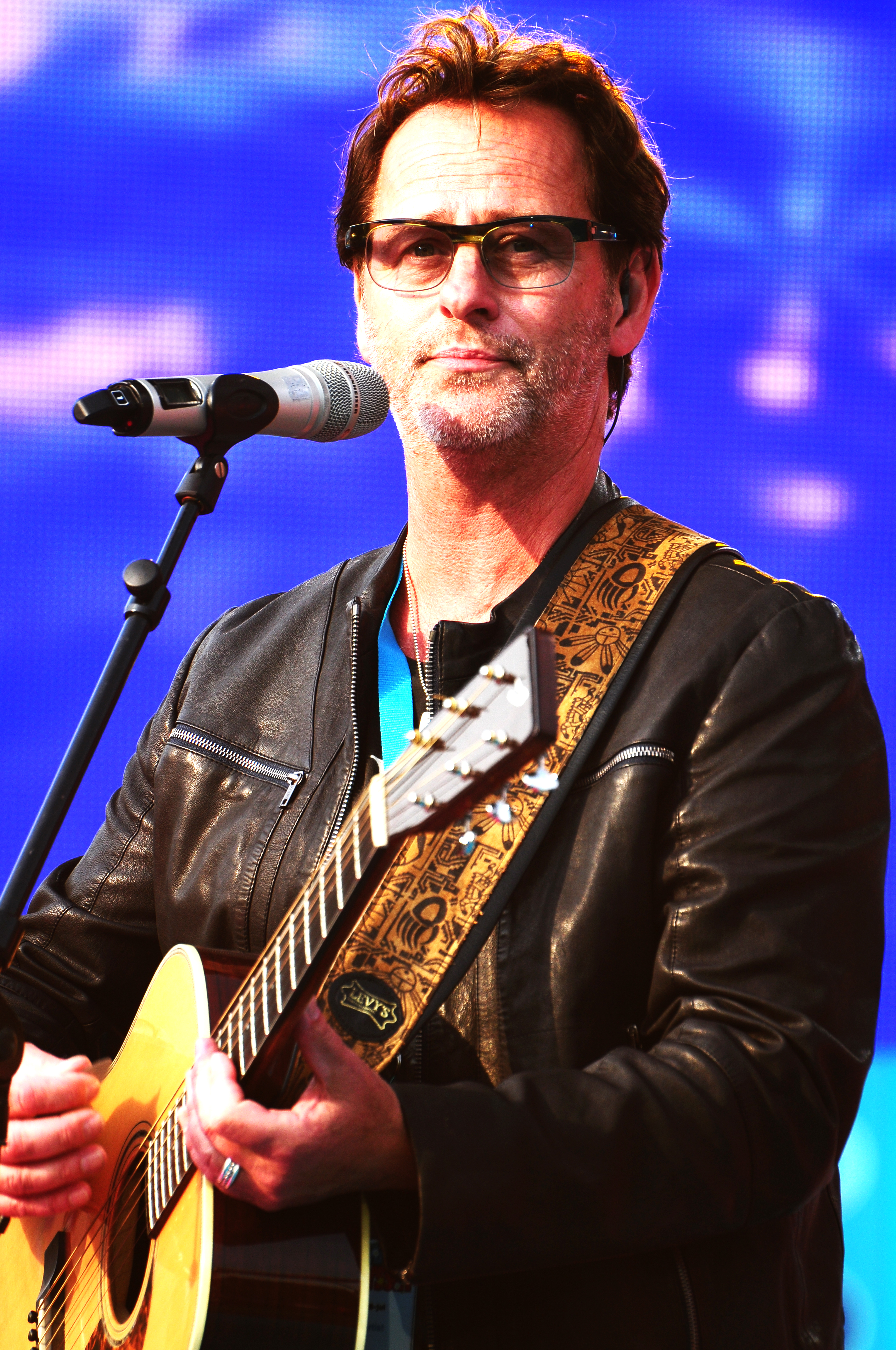 Uno Svenningsson besöker Sommarkrysset för första gången!